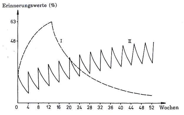 Erinnerungswerte bei zeitlich unterschiedlicher Verteilung der Kontakte nach Zielske (1959,1980) bei massiver (Kurve I) und verteilter (Kurve II) Schaltung von Werbung. Quelle: Aufsatz "The remembering and forgetting of advertising" / Hubert A. Zielske. - 1969 In: "Measuring advertising effectiveness." - Homewood, Ill. [u.a.] : Irwin, (1969), S. 175-181. Scan mit eigener Software durch Bodo Wiska bearbeitet, ohne besondere Schöpfungshöhe.